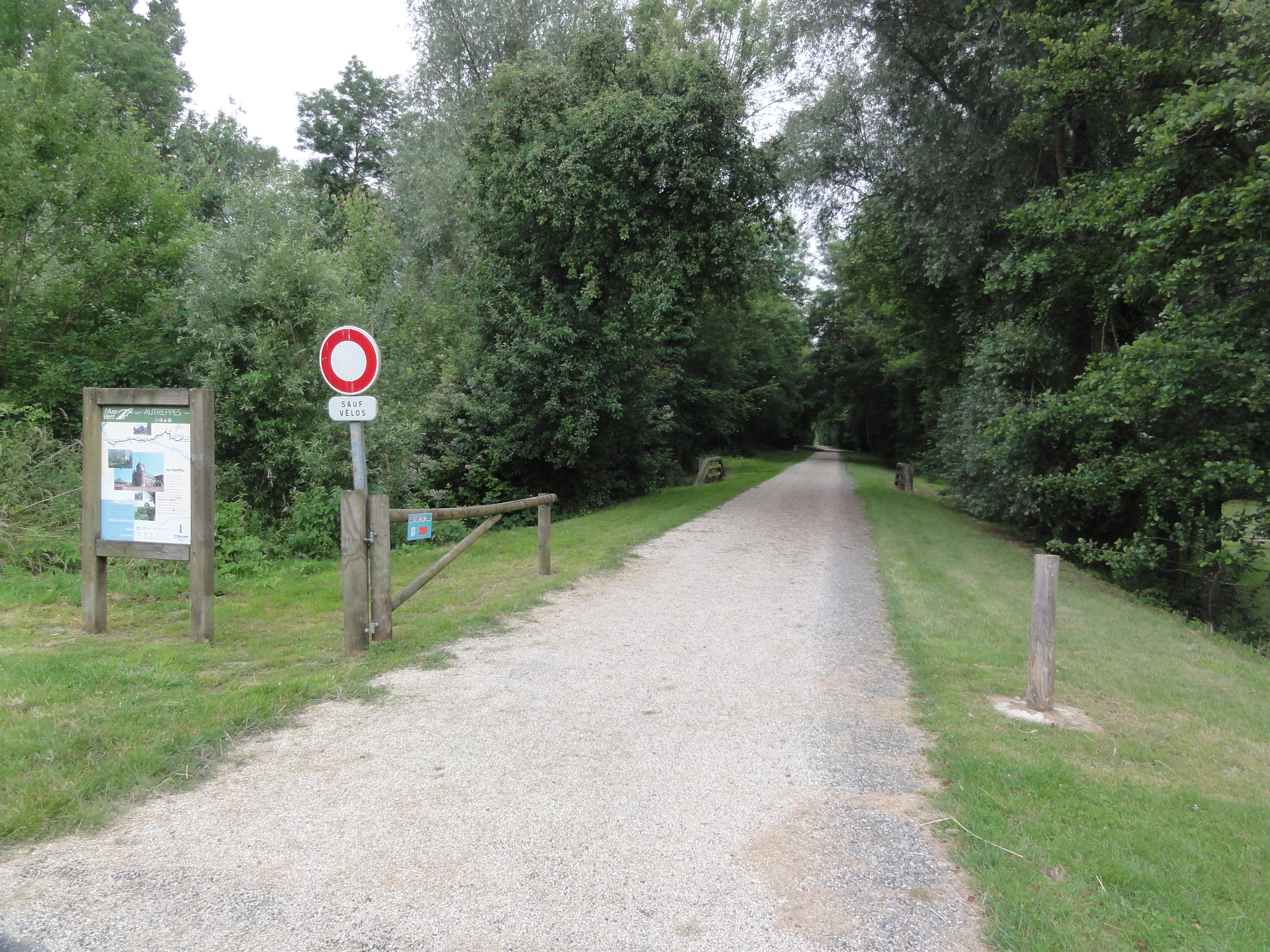 Autreppes (Aisne) Axe vert